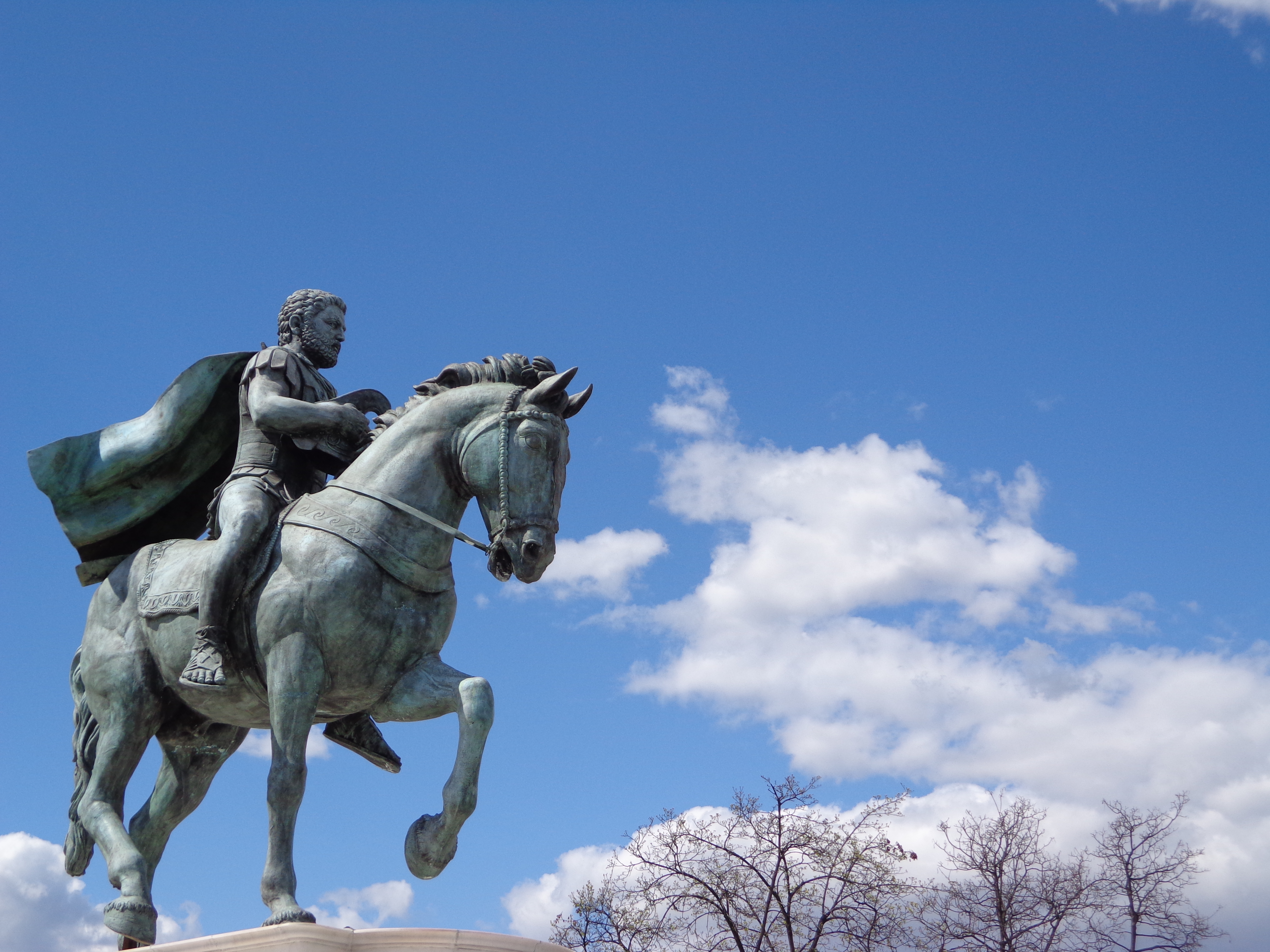 Споменик на Филип II како јава на коњ во Скопската населба Автокоманда, општина Гази Баба